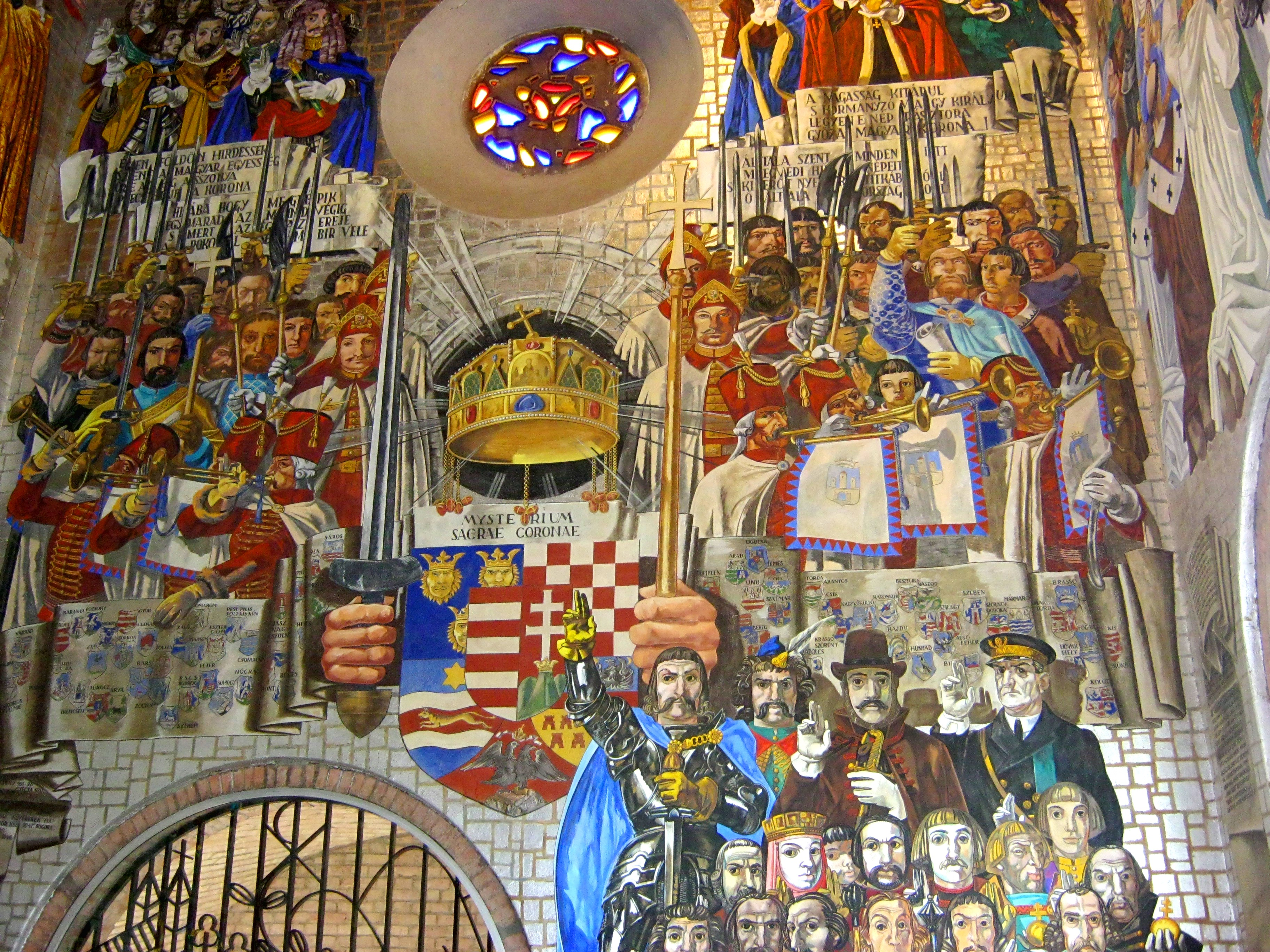 Szent István Mauzóleumát díszítő Aba-Novák Vilmos seccojának részlete - Székesfehérvár. Koronázó Suare, Várkörút 5. 1938-ban a kettős szentév, az Eucharistia és a Szent István Emlékév (Szent István halálának 900. évfordulója) eseményeinek kapcsán a központi kormányzat támogatásával Székesfehérvár város - a hivatalos ünnepségsorozat keretében - olyan megbízásokat tartogatott Aba Novák számára, amelyek művészi karrierjének csúcspontját jelentették. 1938 októberében a vallás- és közoktatásügyi miniszter a székesfehérvári polgármesternél indítványozta a Szent István Emlékév eseményeinek méltó megörökítését a város középületeiben. A kultuszminisztérium, a Műemlékek Országos Bizottsága, valamint a Szent István Emlékév Országos Bizottsága a romkerti mauzóleumban elkészítendő munkákkal Aba Novák Vilmost bízta meg.